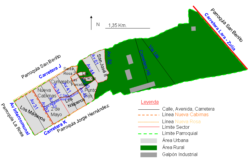 Mapa completo de la Parroquia Rómulo Betancourt, Municipio Cabimas, Estado Zulia, Venezuela